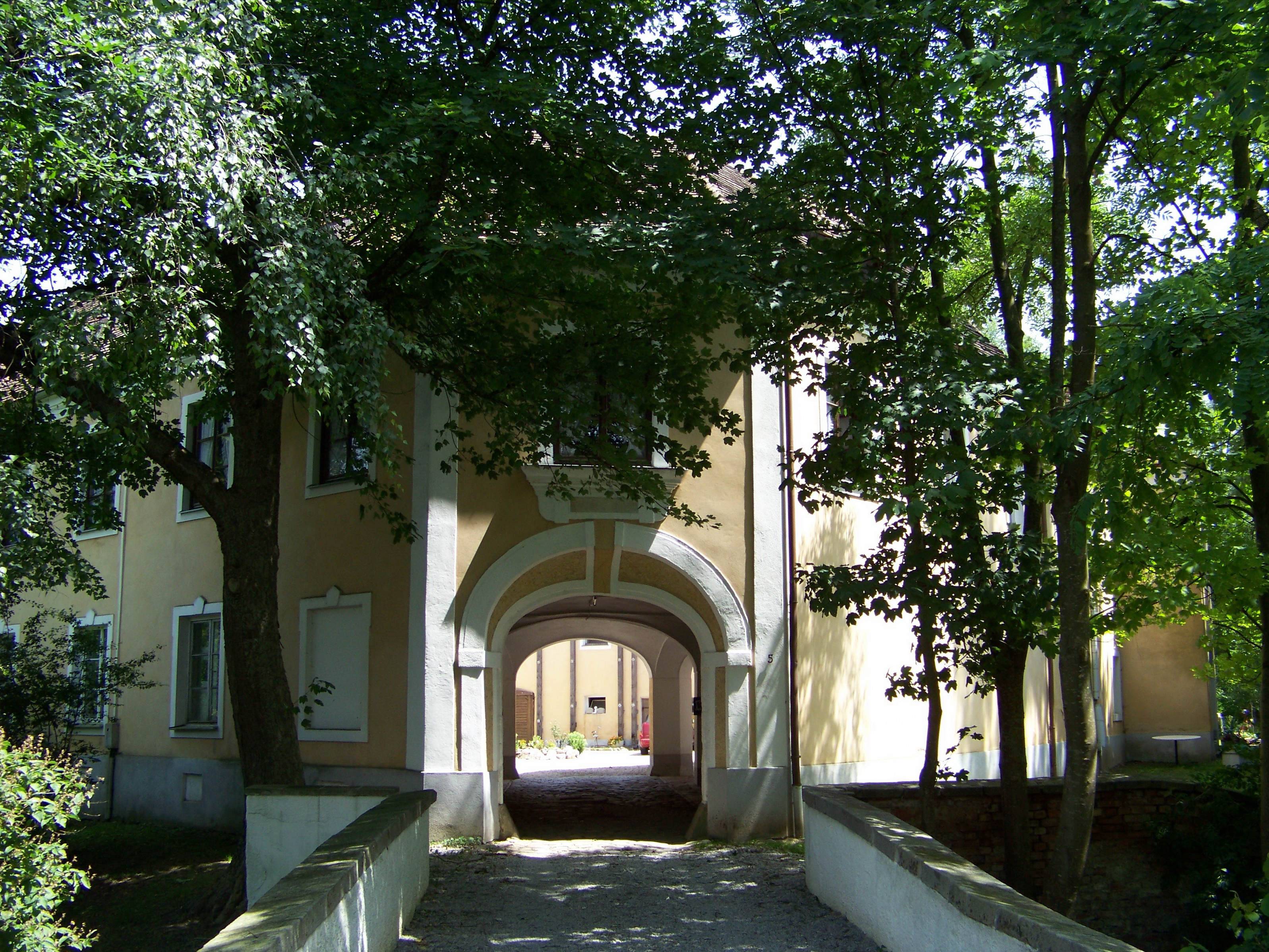 Aiterhofen, Amselfing. Schloß, vierflügelige Weiherhaus-Anlage, gegen 1600, barockisiert 1776 und 1780. Torbogen.